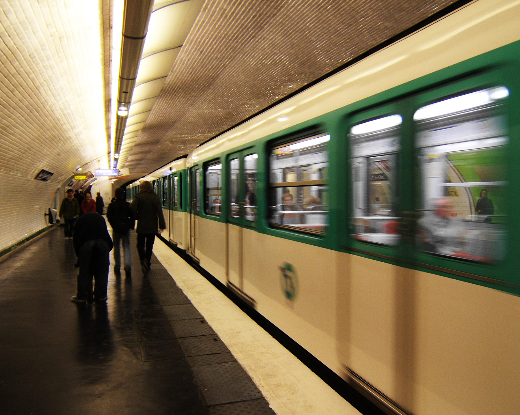 Le station Javel - André Citroën (métro parisien)